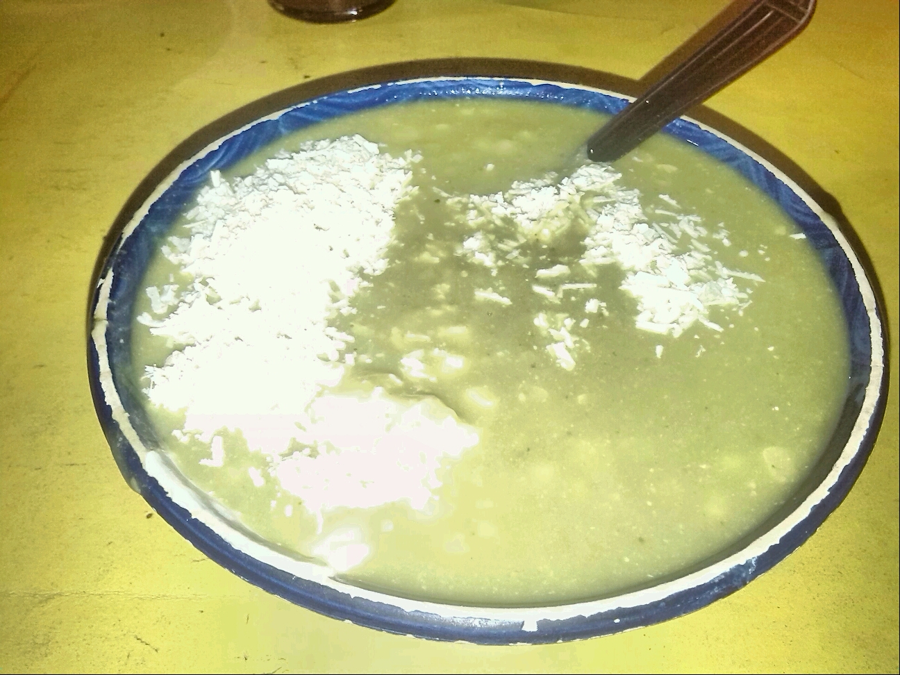 Chileatole. Platillo típico de Orizaba, Veracruz